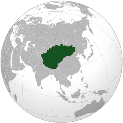 Историческая область Монголия